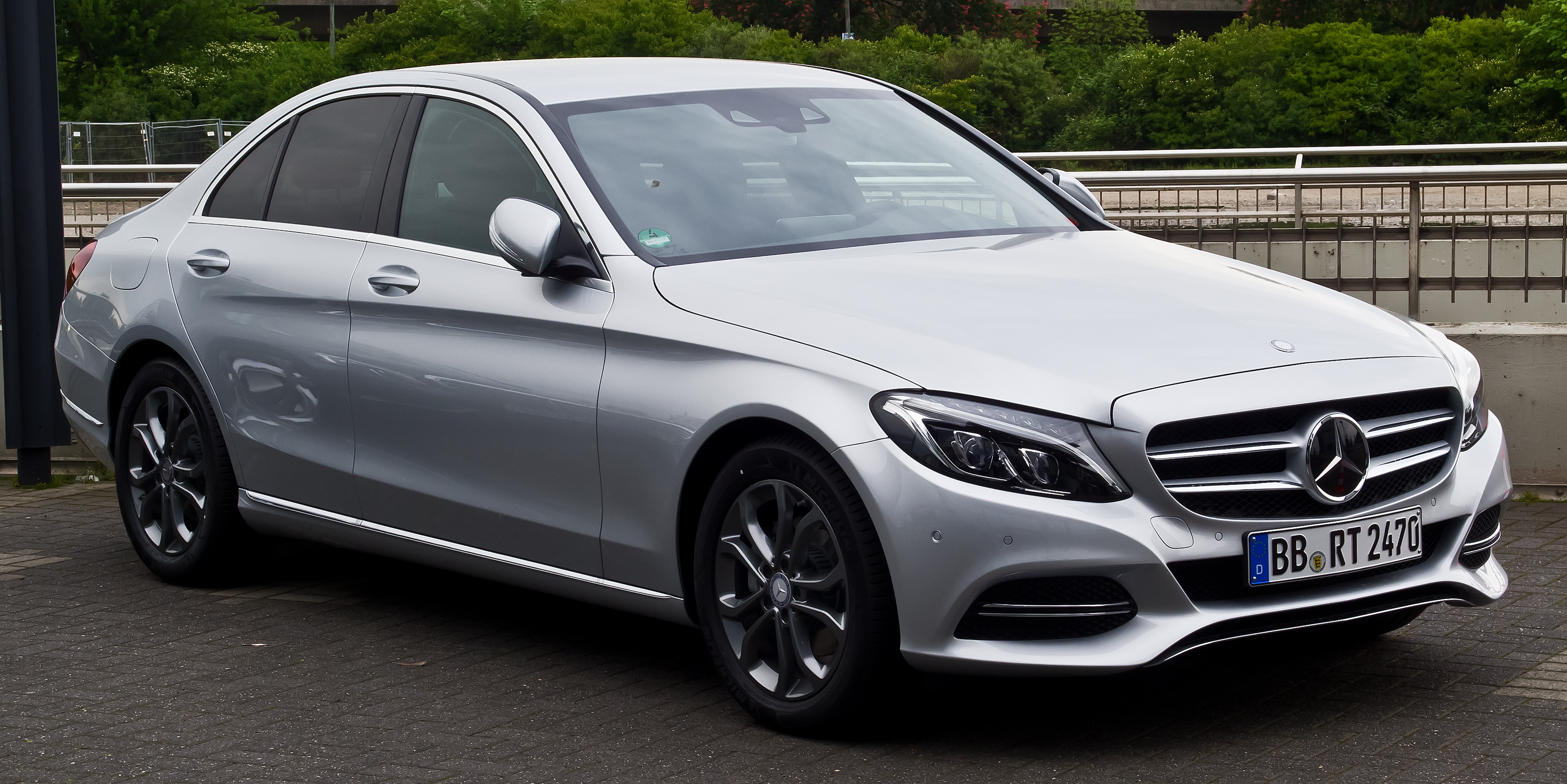 Mercedes-Benz C 200 Avantgarde (W 205)